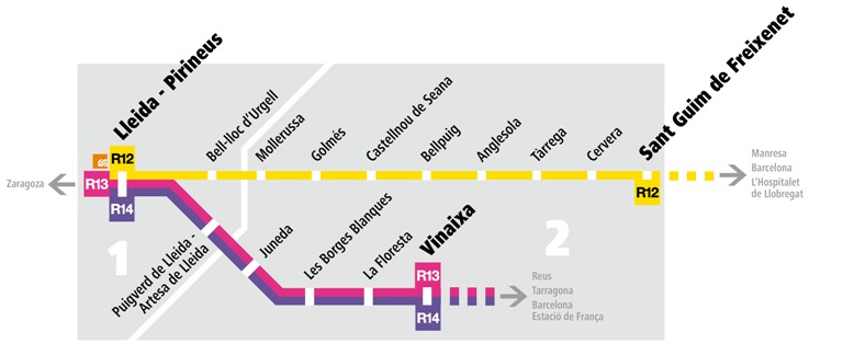 Esquema del servei integrat de la rodalia de Lleida